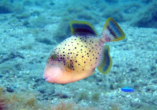 Pseudobalistes flavimarginatus